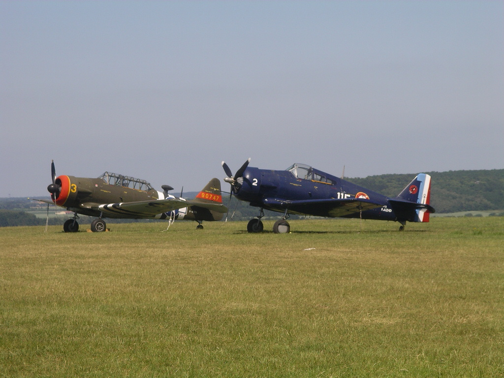 Deux avions historiques sur l'aérodrome de la Ferté-Alais (LFFQ). Un North American T-6 Texan, immatriculé F-AZRB, à gauche, et un North American NA-68 immatriculé F-AZHD, à droite.